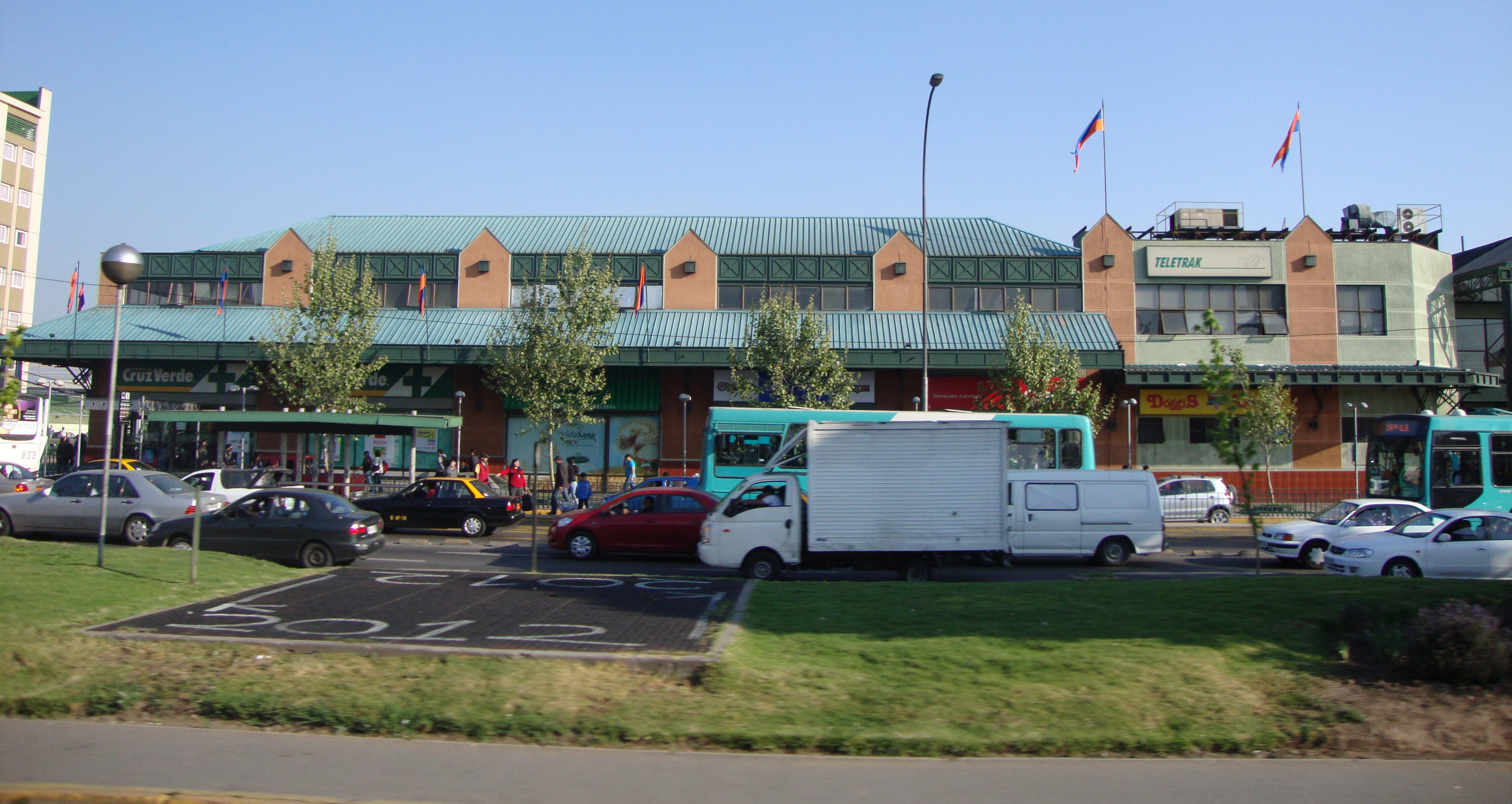 Imagen del Terminal Alameda.